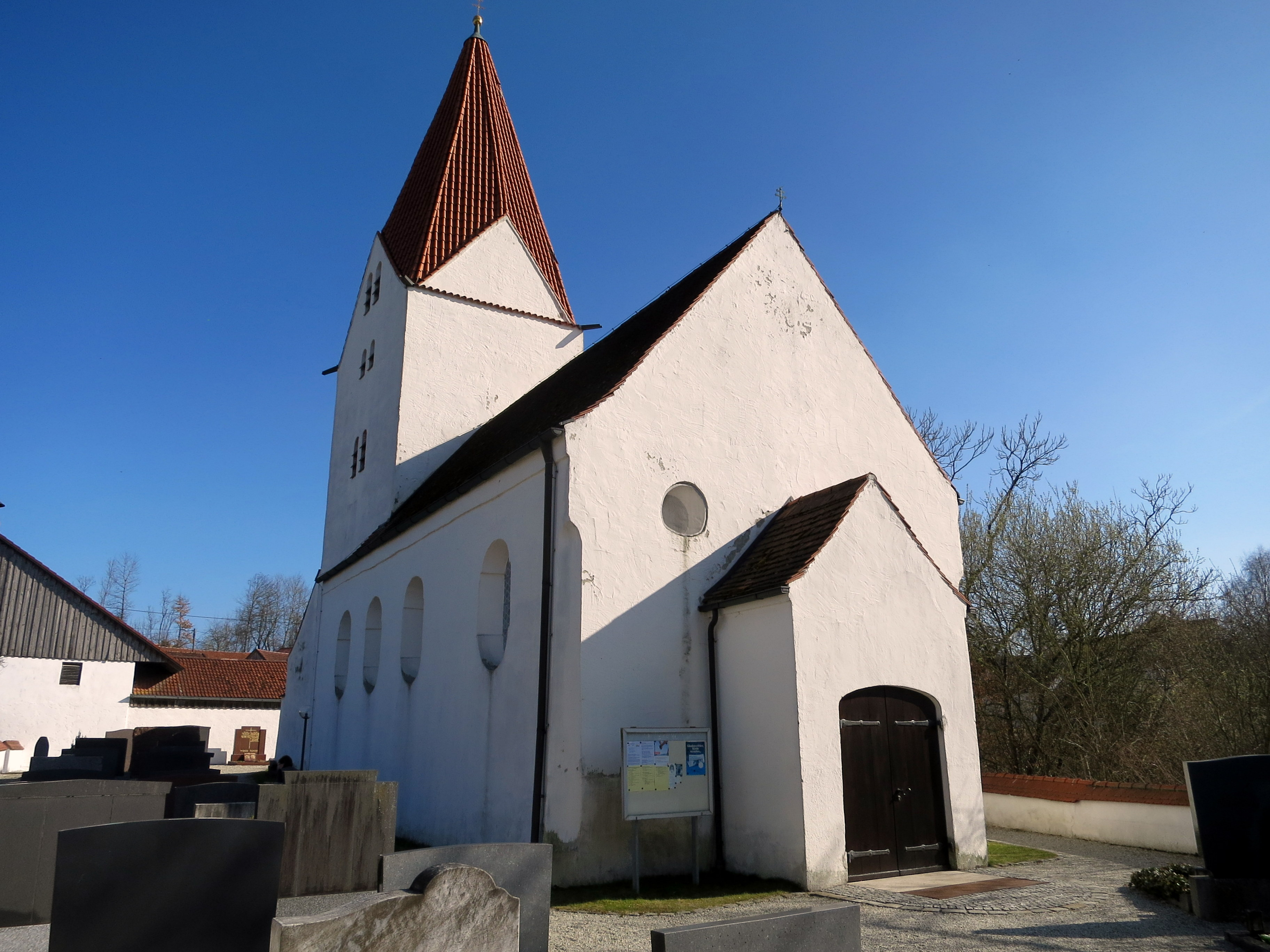 Die Filialkirche mit ihrem uralten dicken Turm